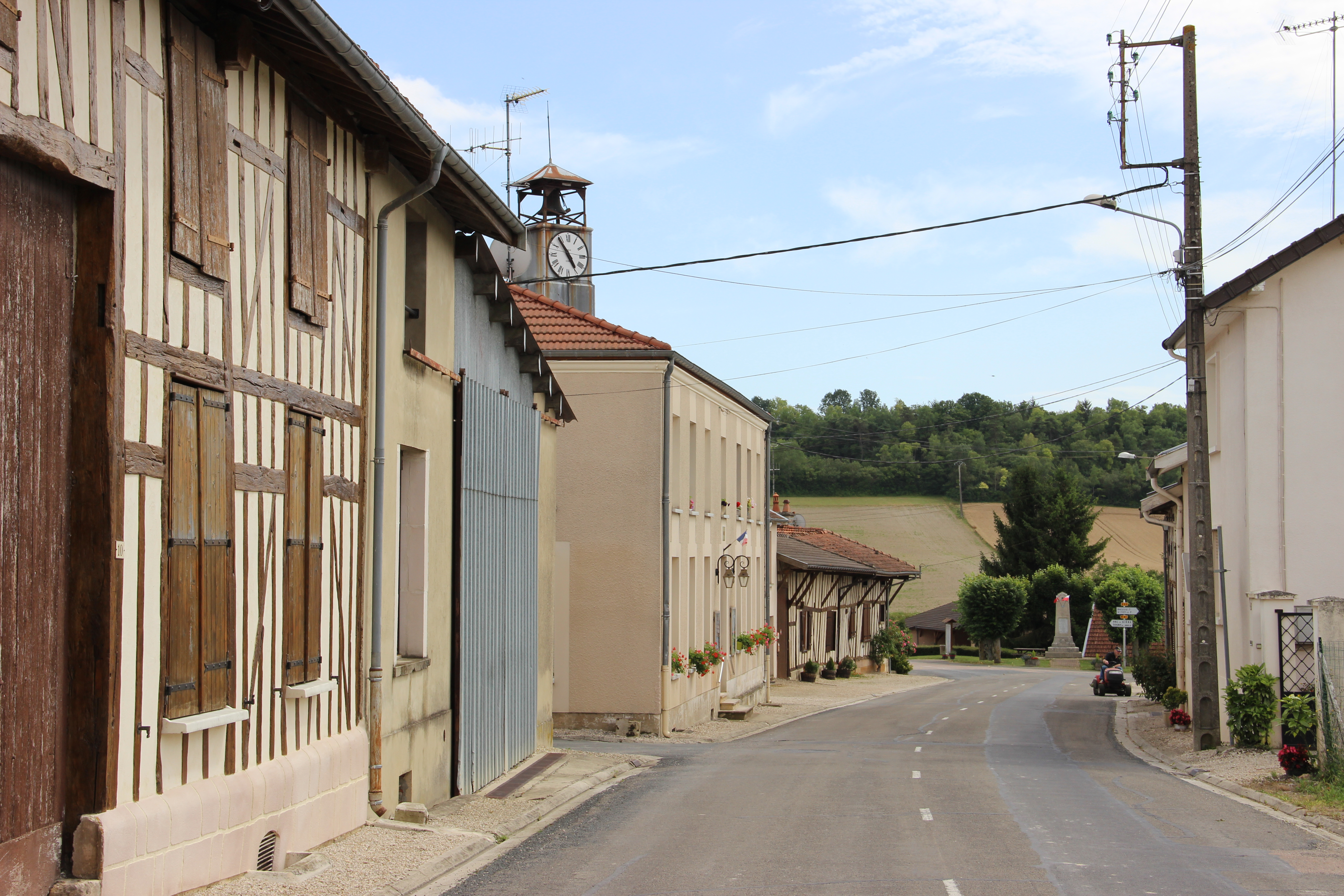 La rue principale